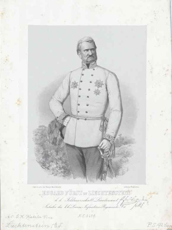 Prinz Eduard von und zu Liechtenstein (1809 - 1864)